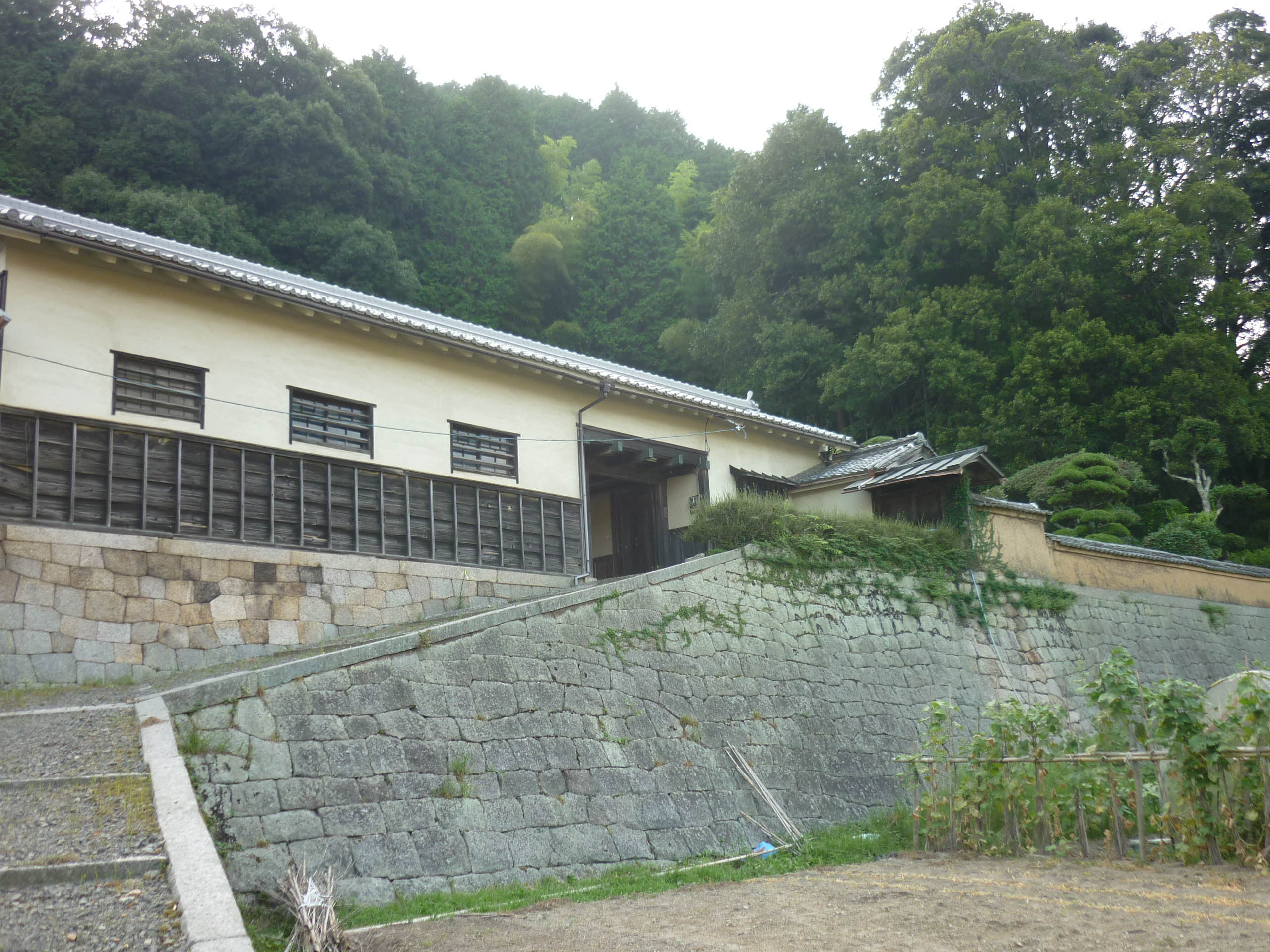 小山田家分家